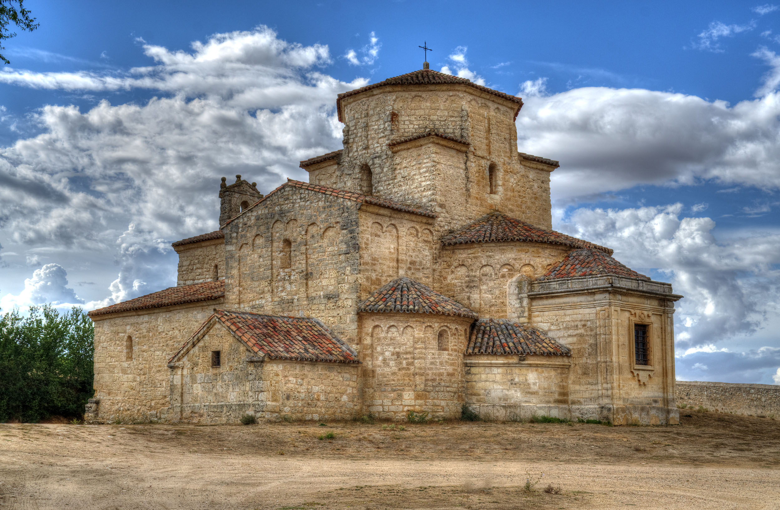 Ubicada en la afueras de Urueña, Nuestra Señora de la Anunciada es de estilo románico lombardo y debió construir en el siglo XI. Aunque ya tengo alguna imagen, esta es la primera vez que conseguí fotografiarla en un día con nubes.